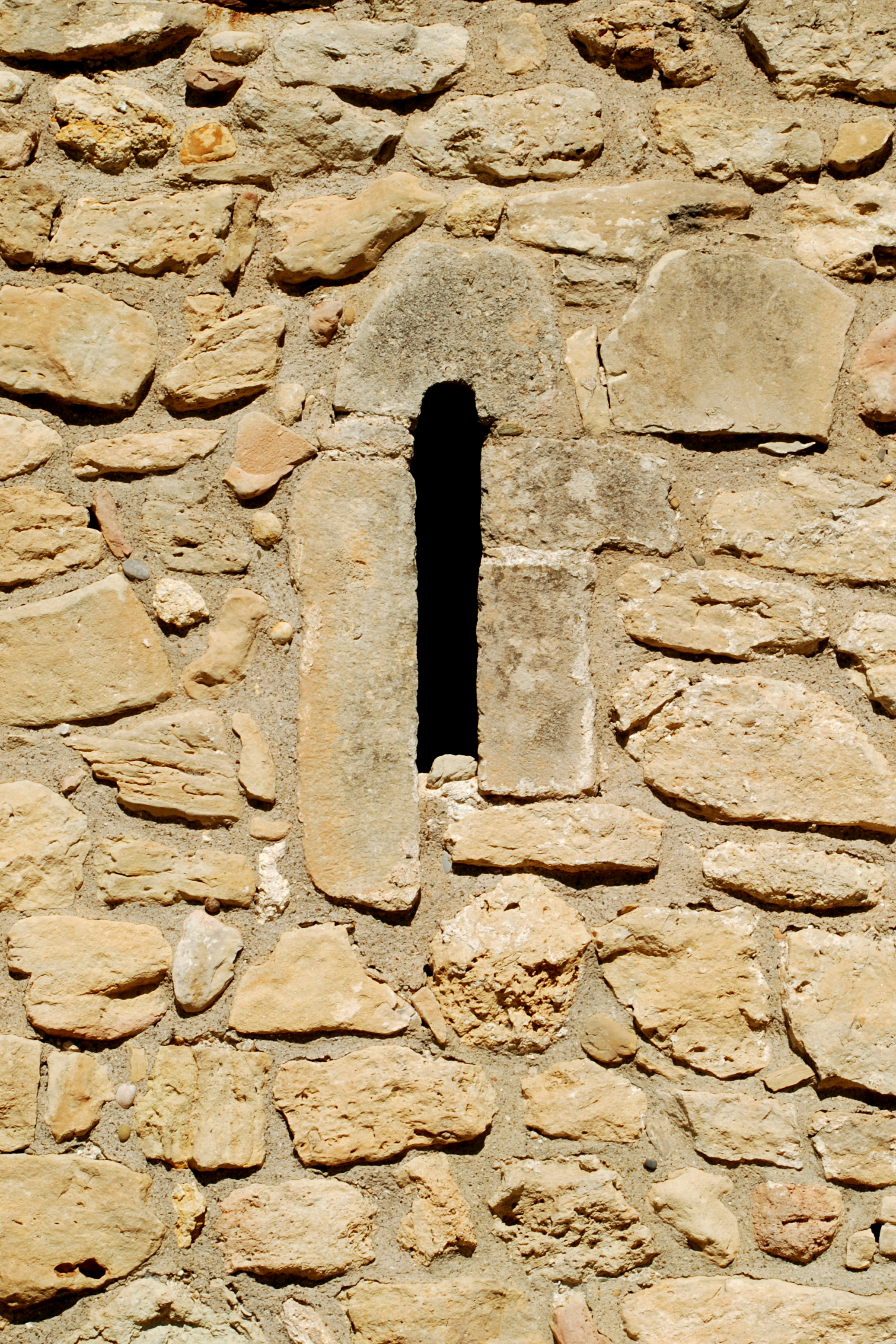 France - Languedoc - Aude - Moussan - chapelle Saint-Laurent (préroman) - baie de la face est du chevet .